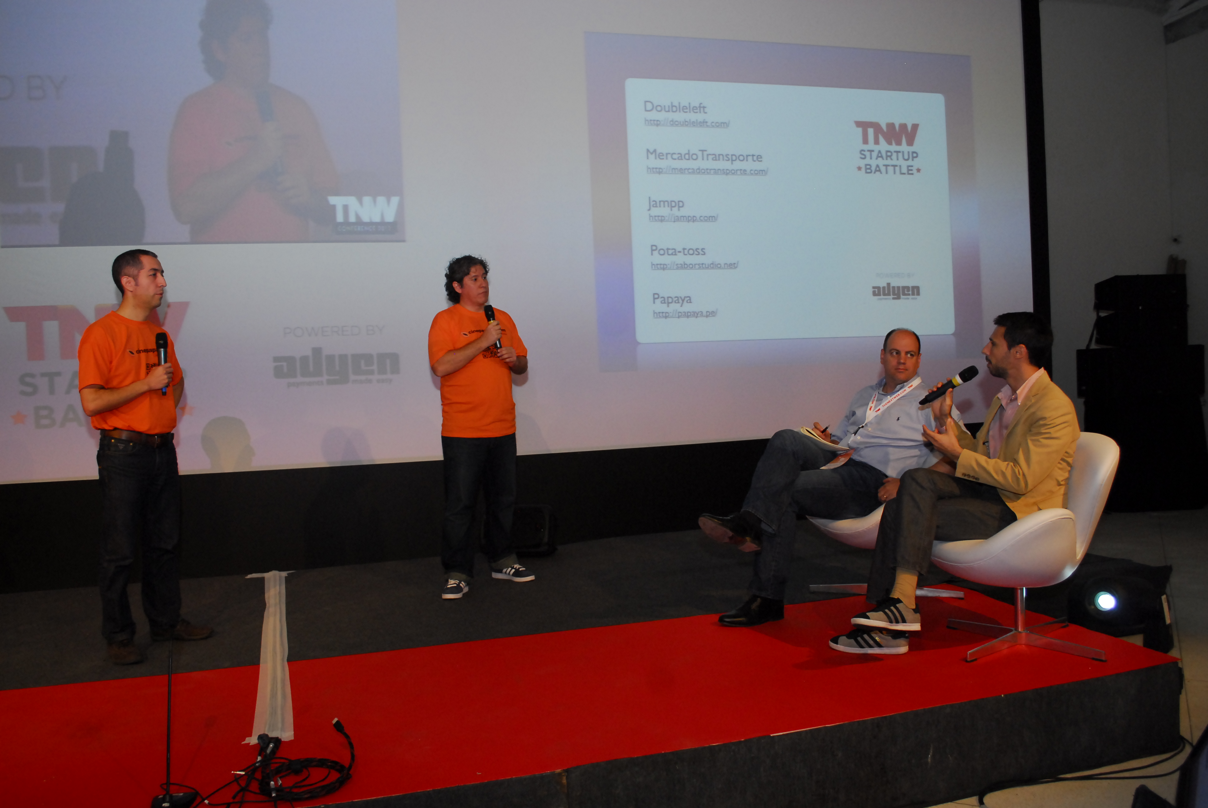 Gary Urteaga and Manuel Olguin, São Paulo 2012